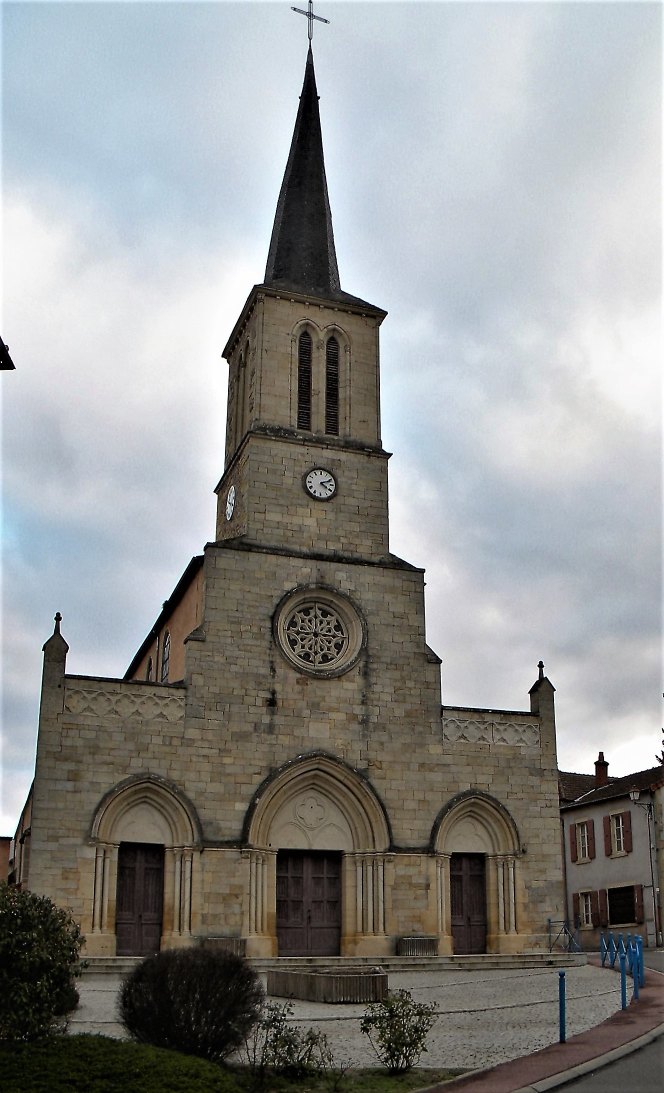 Façade de l'église de Coublanc